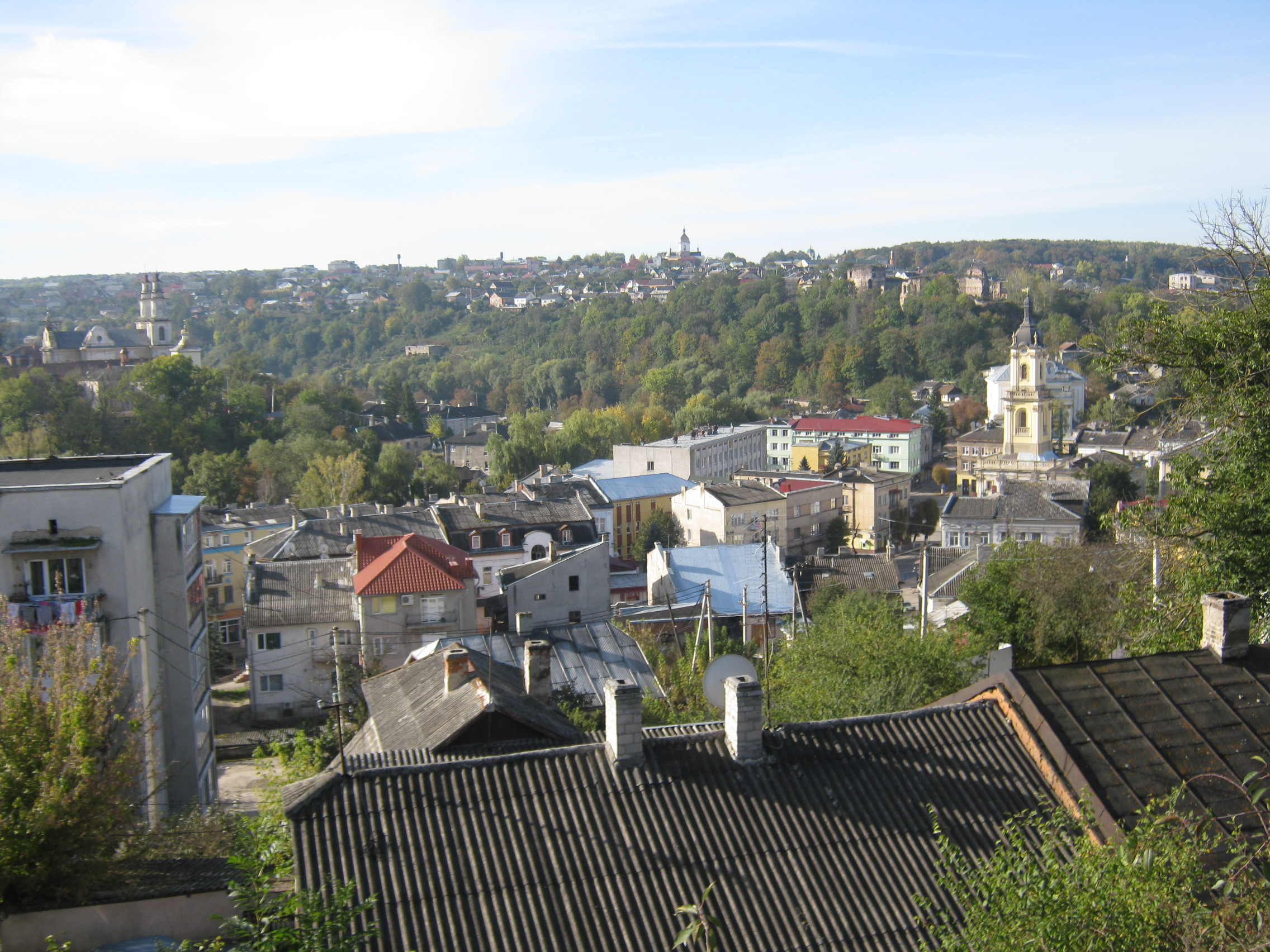 Вигляд на місто з Торговиці. 6.10.2013